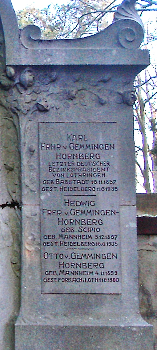 Karl von Gemmingen Hornberg (1857-1935) letzter Bezirkspräsident von Deutsch-Lothringen, Grabstein, Hauptfriedhof Mannheim